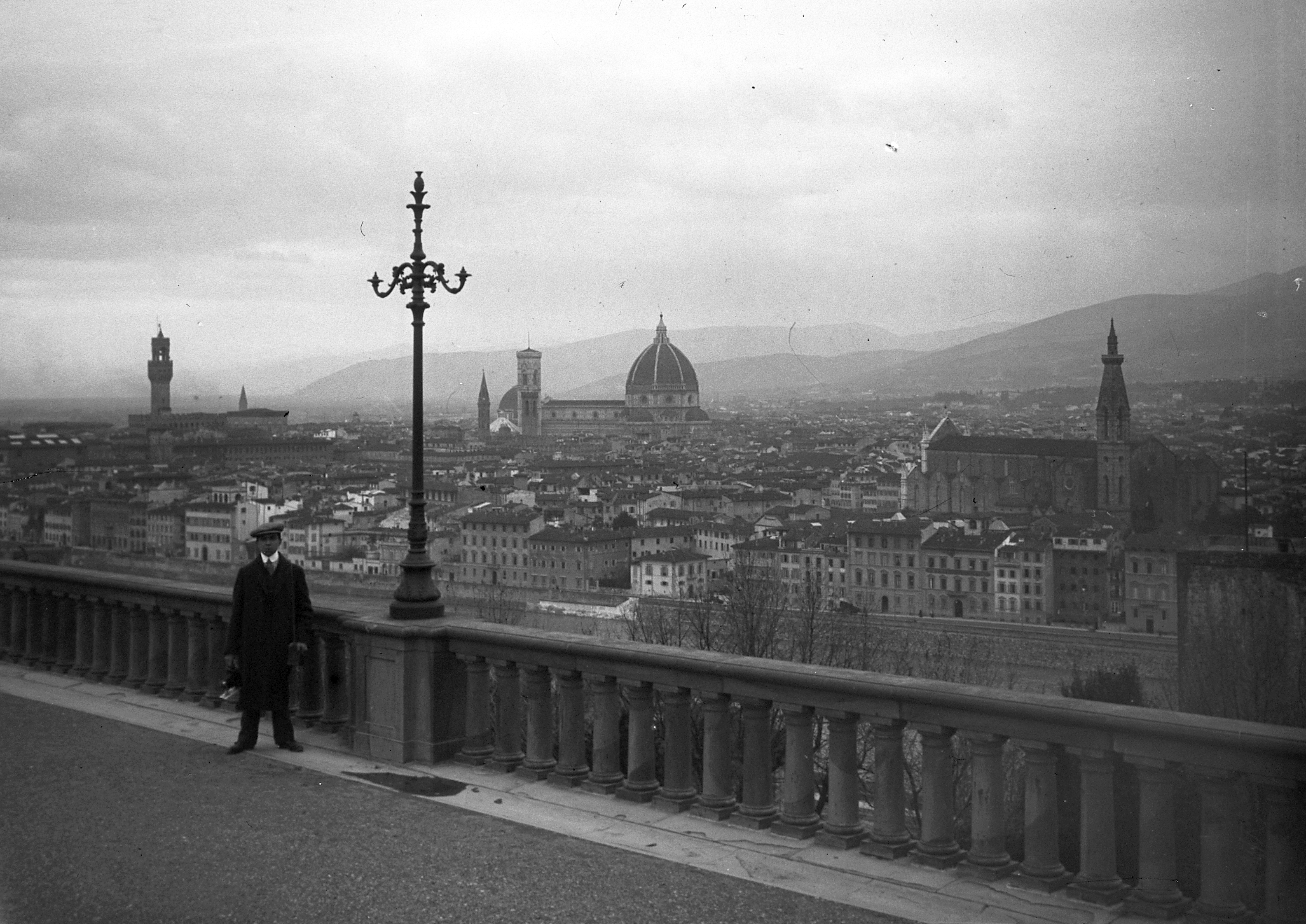 látkép a Piazzale Michelangelóról nézve. Balról a Palazzo Vecchio tornya, középen a Dóm és a Campanile, jobbról a Santa Croce tömbje. Location: Italy, Florence Tags: picture Title: látkép a Piazzale Michelangelóról nézve. Balról a Palazzo Vecchio tornya, középen a Dóm és a Campanile, jobbról a Santa Croce tömbje.